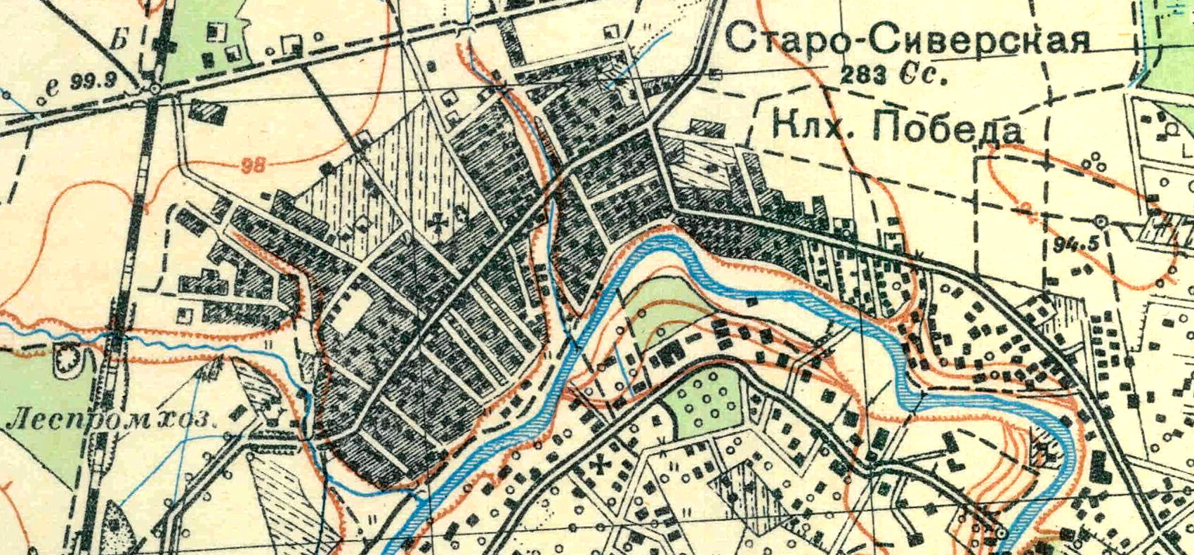 Топографическая карта Ленинградской области, квадрат О-36-13-В-в (Старо-Сиверская), деревня Старосиверская